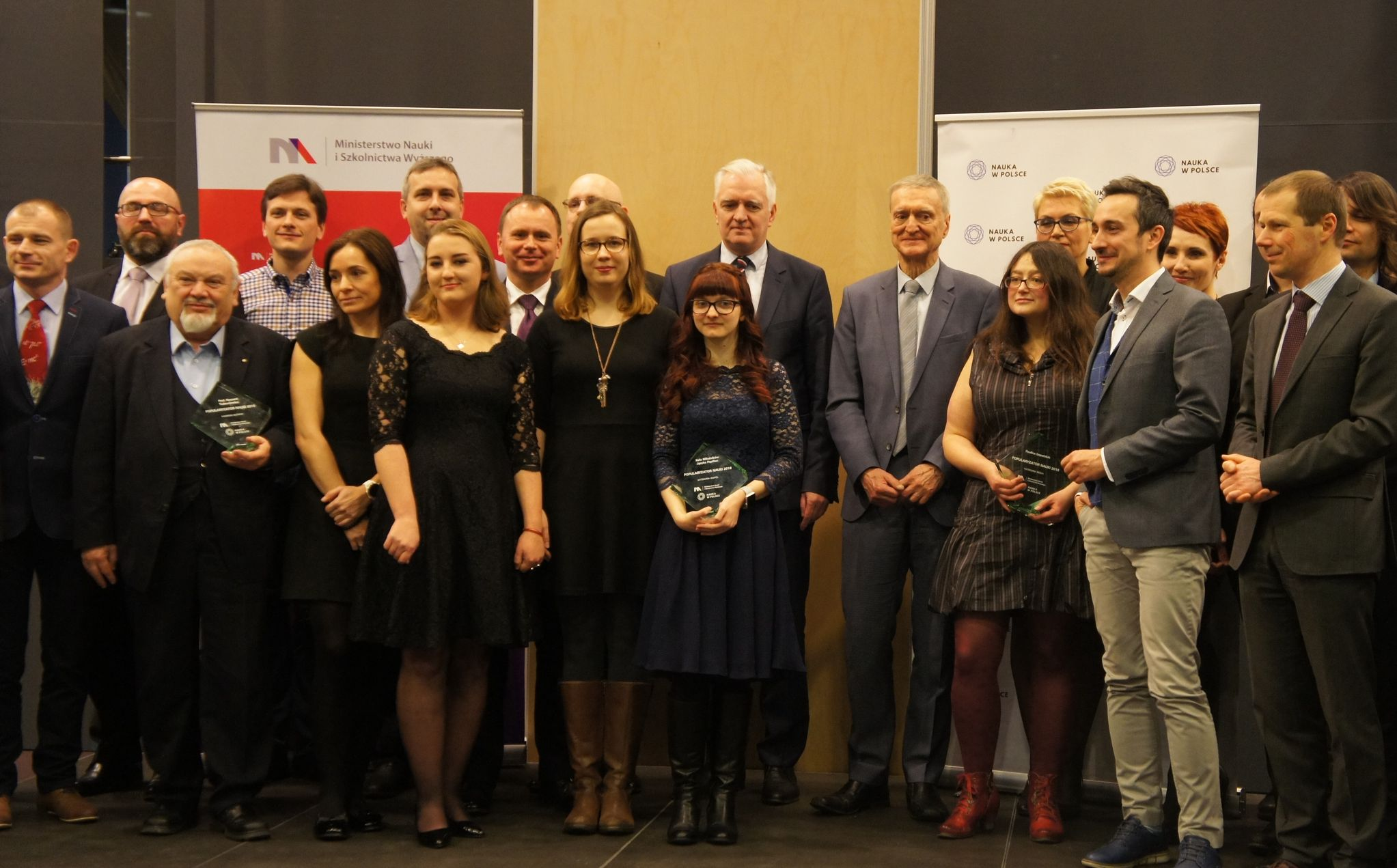 Gala konkursu "Popularyzator Nauki" (XIV edycja, nagrody za rok 2018) - 7 stycznia 2019, Centrum Nauki Kopernik w Warszawie.